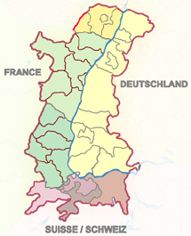 Karte des Oberrheingebiet, mit GISOR produziert